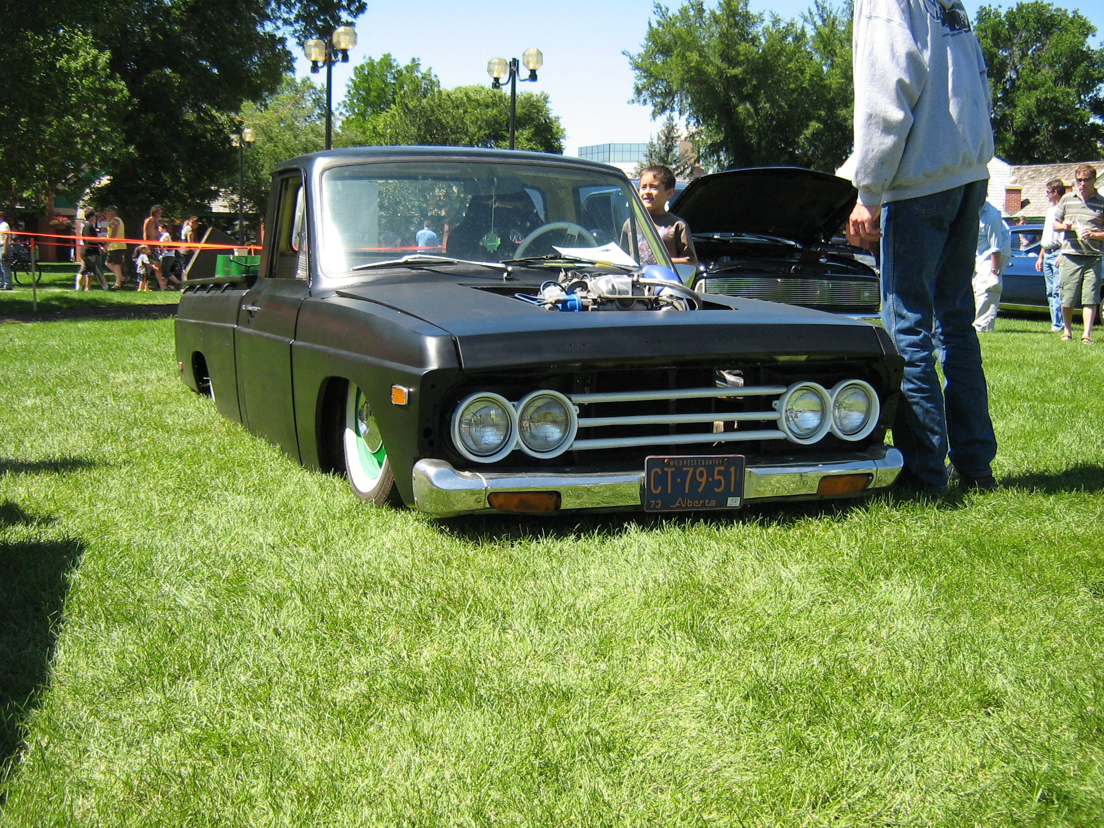 1973 Mazda Truck Low Rider